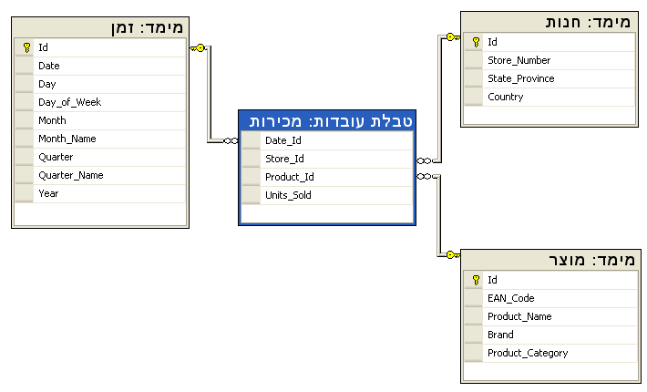 דוגמה למסד נתונים הבנוי בסכמת כוכב. במרכז עומדת טבלת העובדות המקשרת לרשומות בטבלאות המימדים